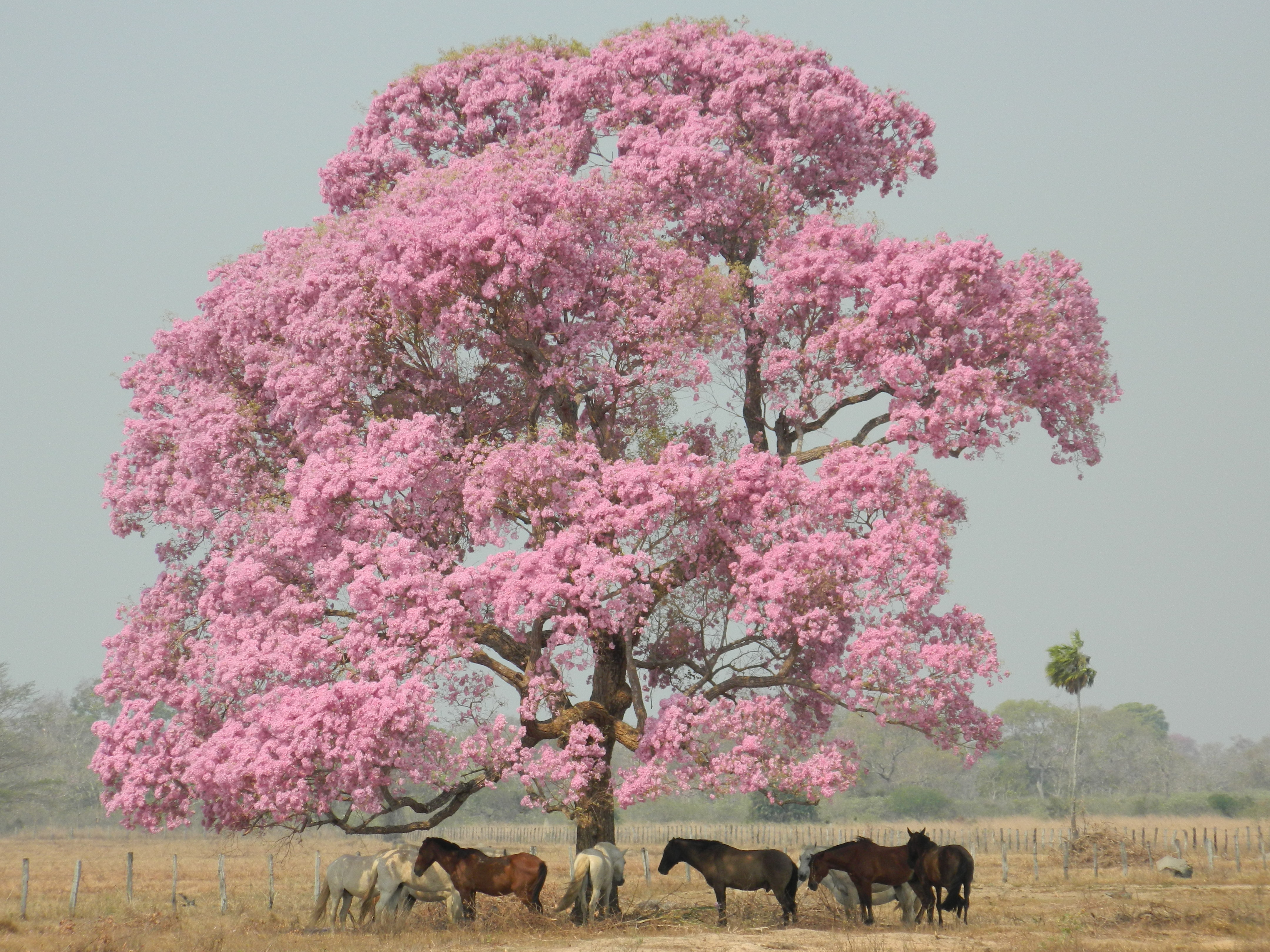 Insira_uma_descrição_para_sua_foto